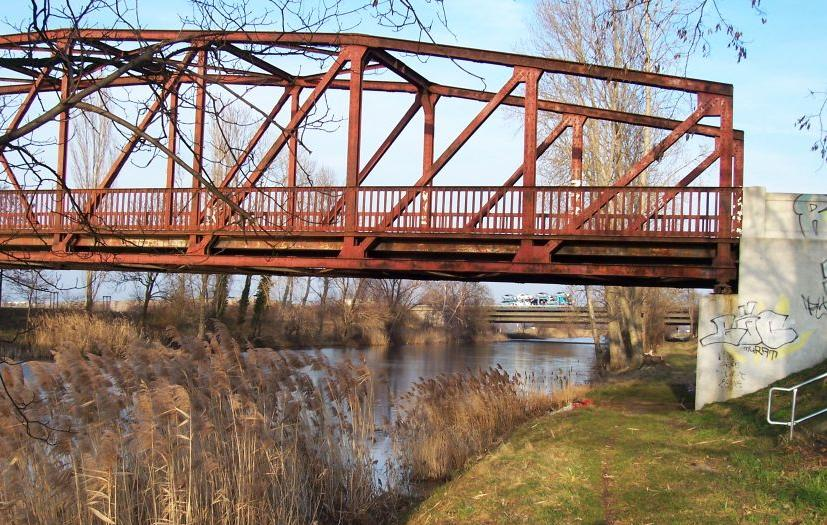 Brücke bei Günthersdorf über den Saale-Elster-Kanal, im Hintergrund die Brücke der A9